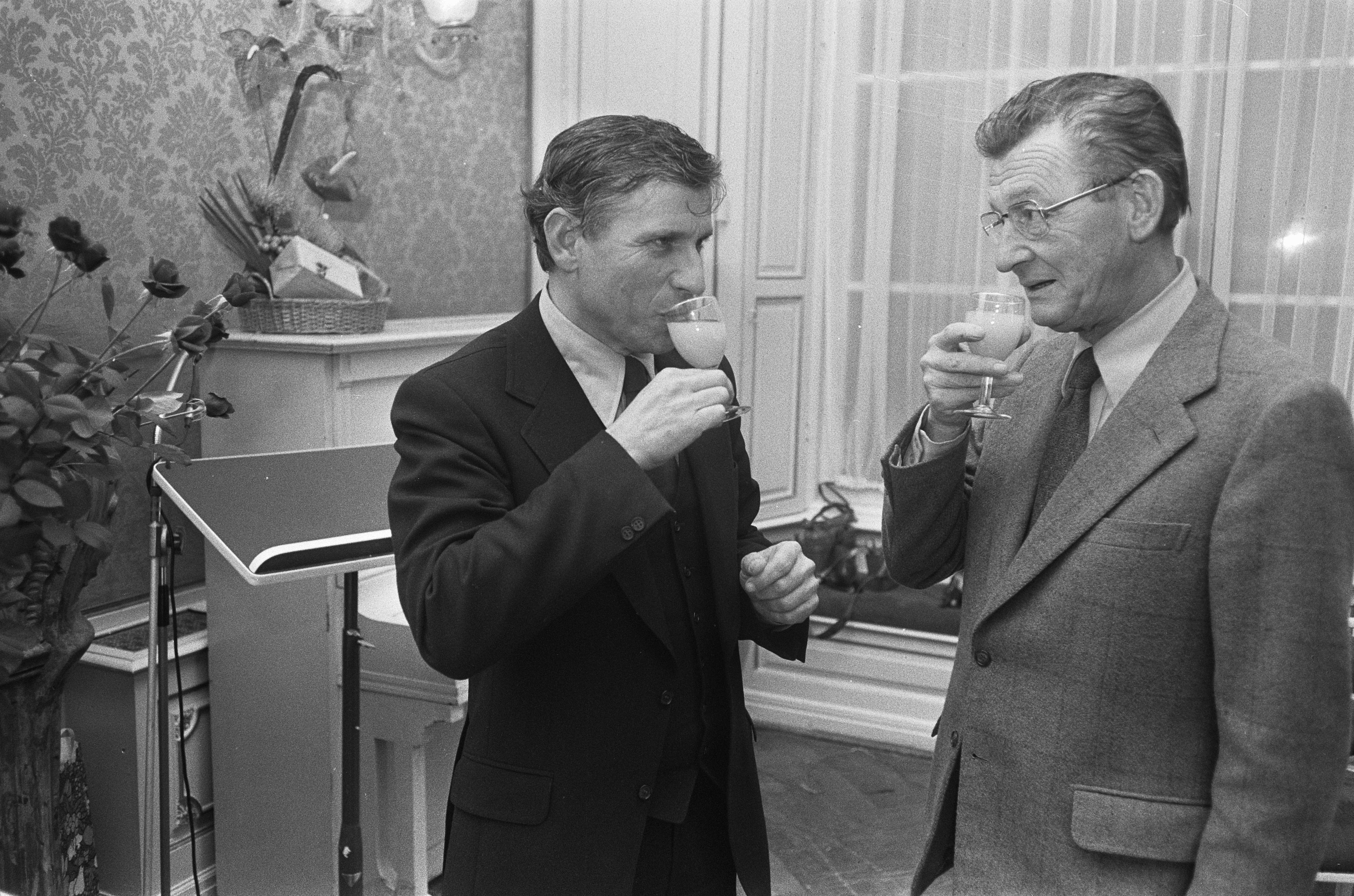 Collectie / Archief : Fotocollectie Anefo Reportage / Serie : Receptie voor Gerard Reve ter gelegenheid van zijn 50e verjaardag en 25-jarig schrijverschap Beschrijving : Gerard Reve (links) met Simon Carmiggelt Datum : 14 december 1973 Trefwoorden : auteurs, jubilea, recepties, schrijvers, verjaardagen Persoonsnaam : Carmiggelt, Simon, Reve, Gerard van het Fotograaf : Fotograaf Onbekend / Anefo Auteursrechthebbende : Nationaal Archief Materiaalsoort : Negatief (zwart/wit) Nummer archiefinventaris : bekijk toegang 2.24.01.05 Bestanddeelnummer : 926-8885